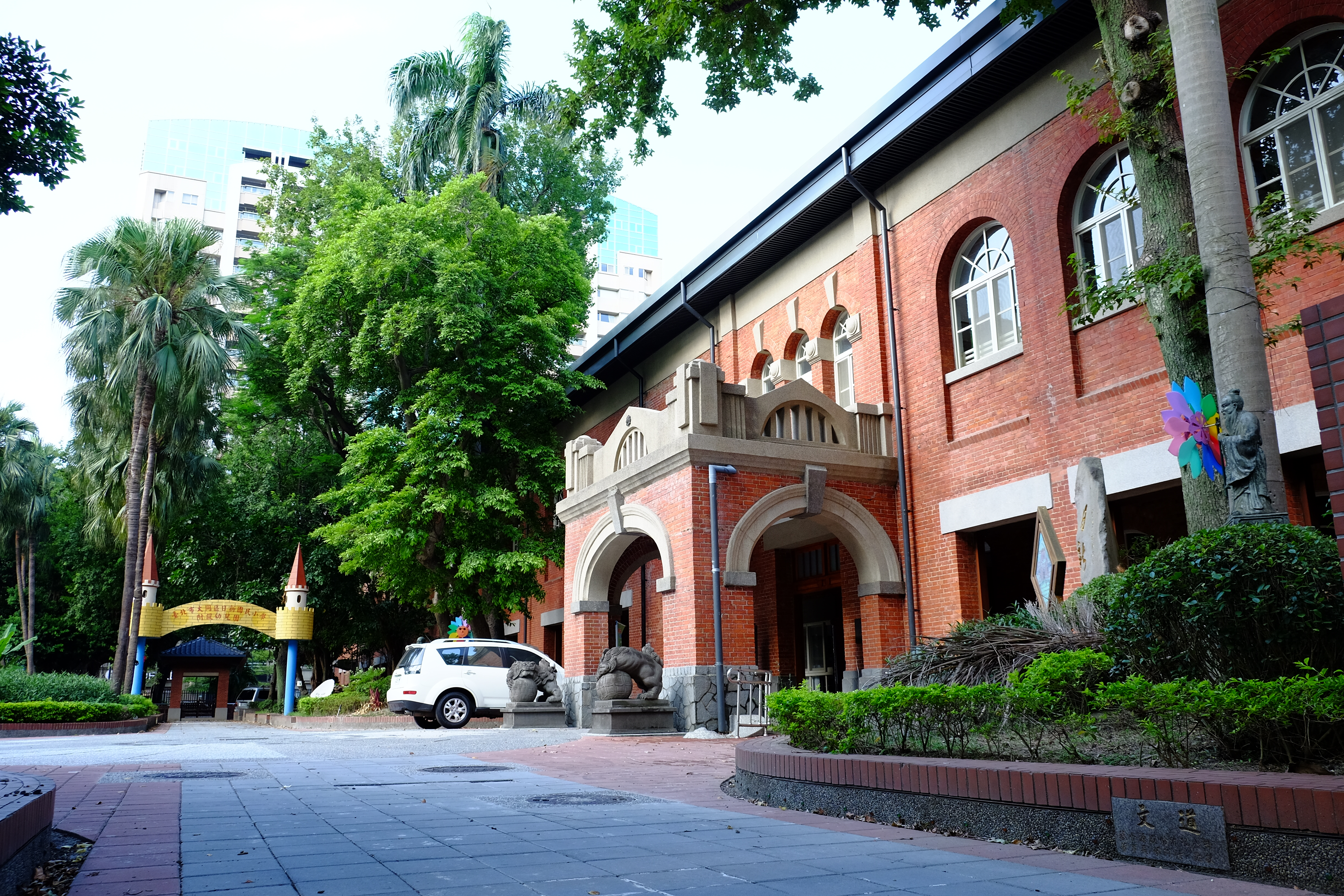 2016年大同區日新國民小學紅樓 Taipei Municipal Rixin Elementary School